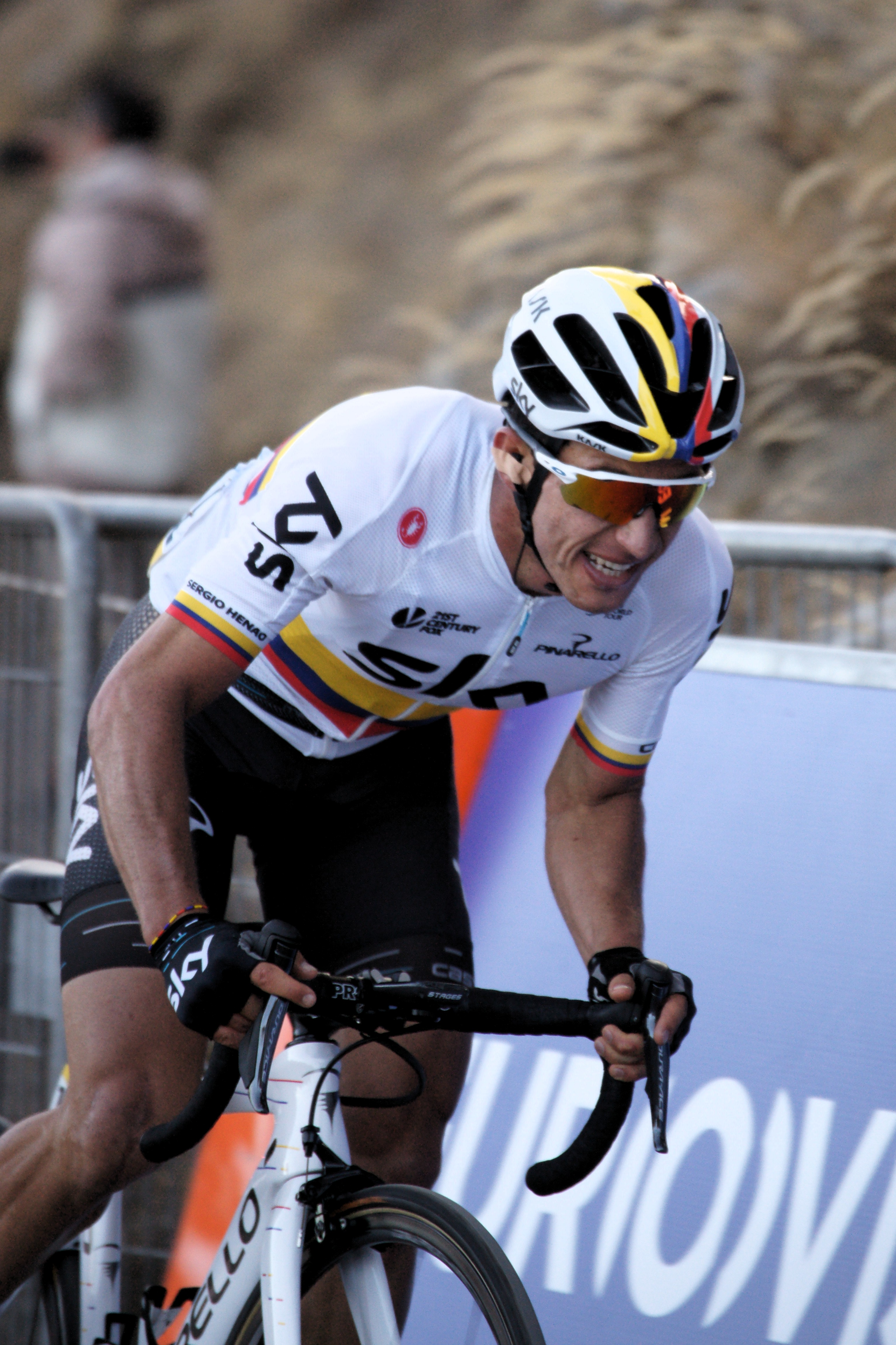 Sergio Henao Roubion Paris-Nice 2017